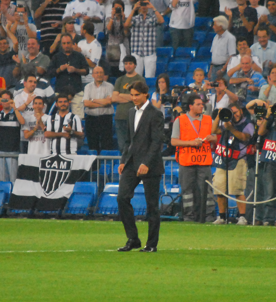 Primer partido de la Champions Legue Real Madrid 2 - Ajax 0 15 septiembre 2010